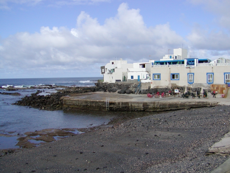 Old harbour El Coltillo